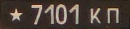 Казахстанский военный автомобильный номер